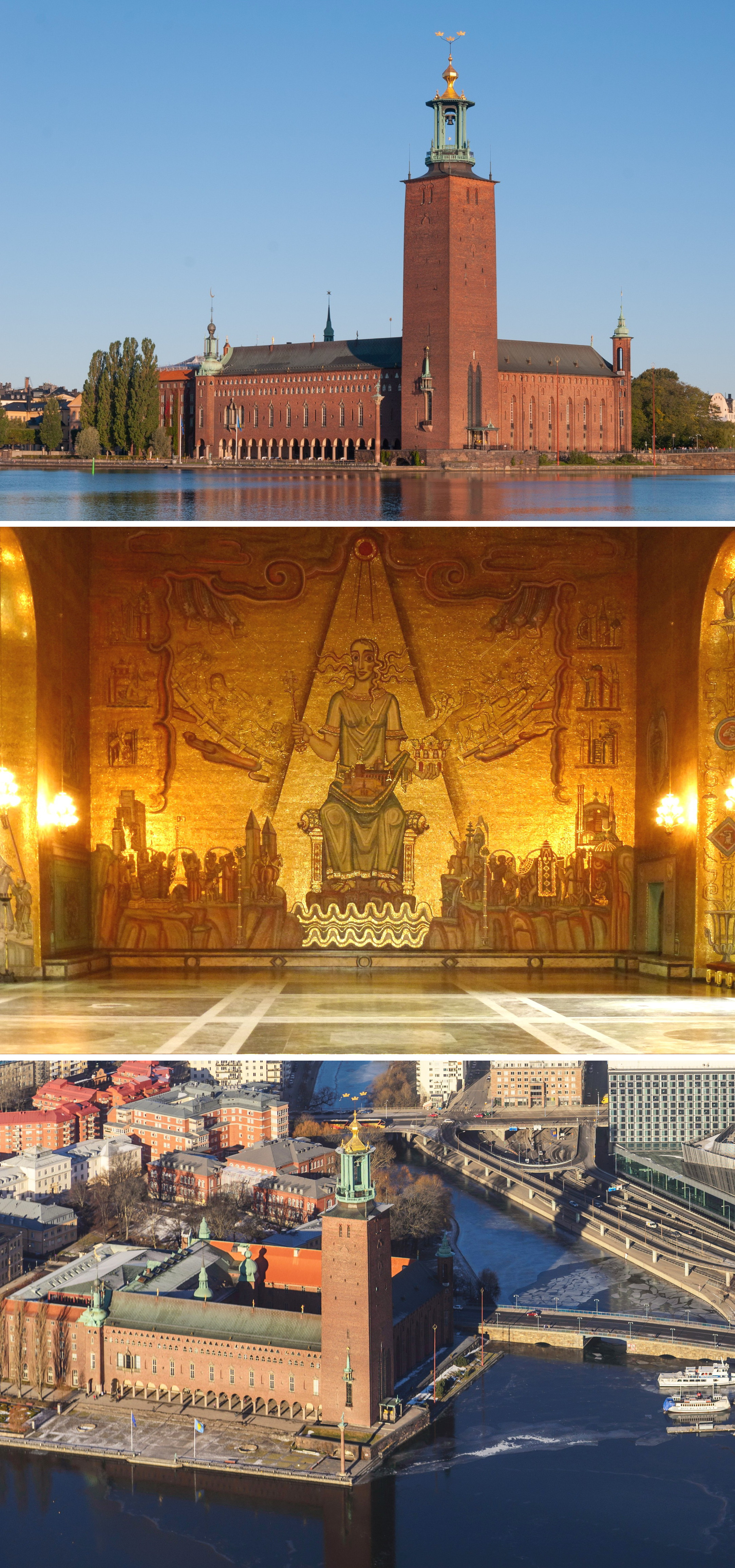 Stockholms stadshus kollage, byggnaden och Mälardrottningen